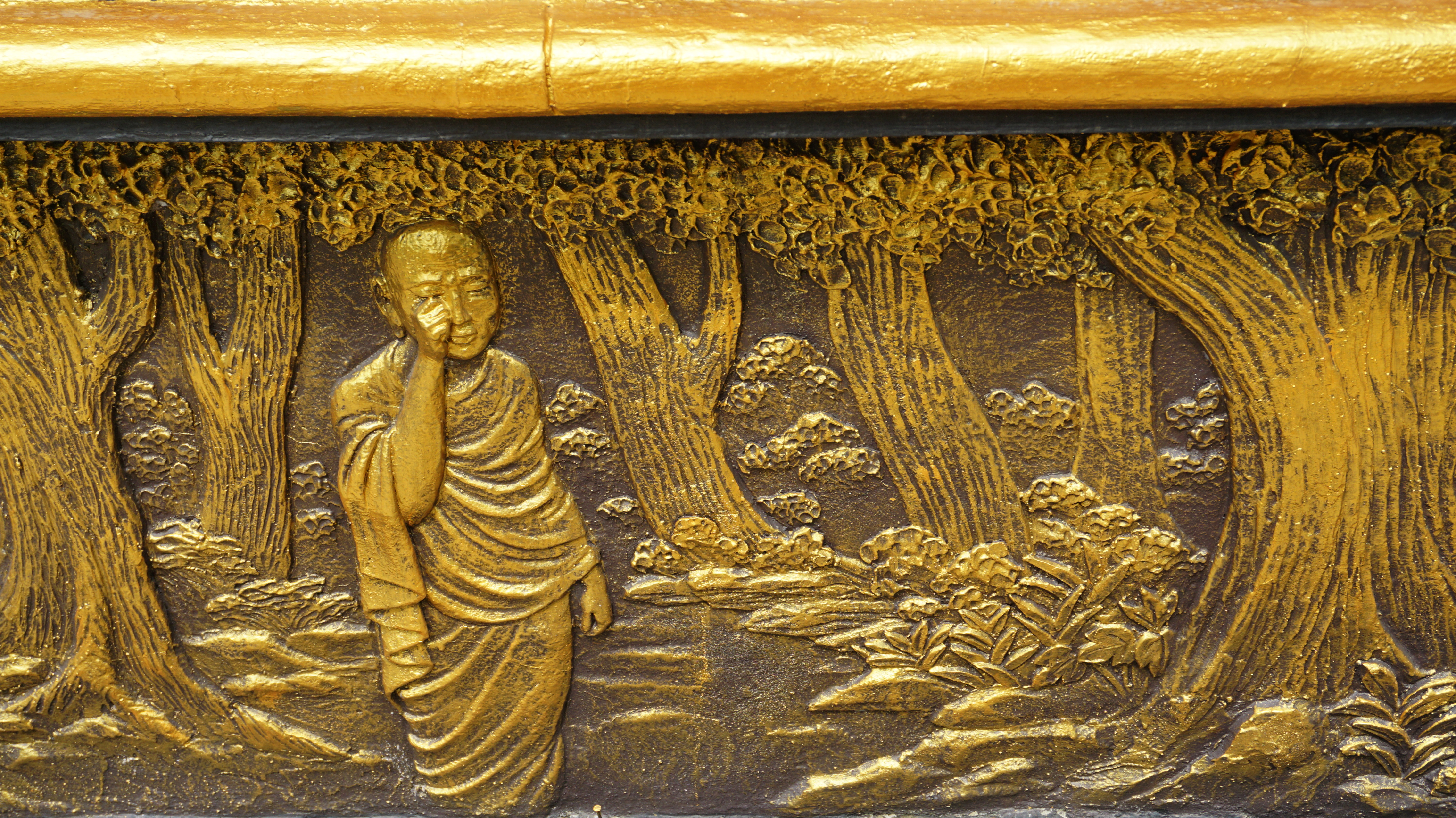 Maha Vihara Mojopahit, Trowulan, East Java